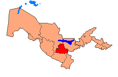 Uzbekistan - Samarqand Province